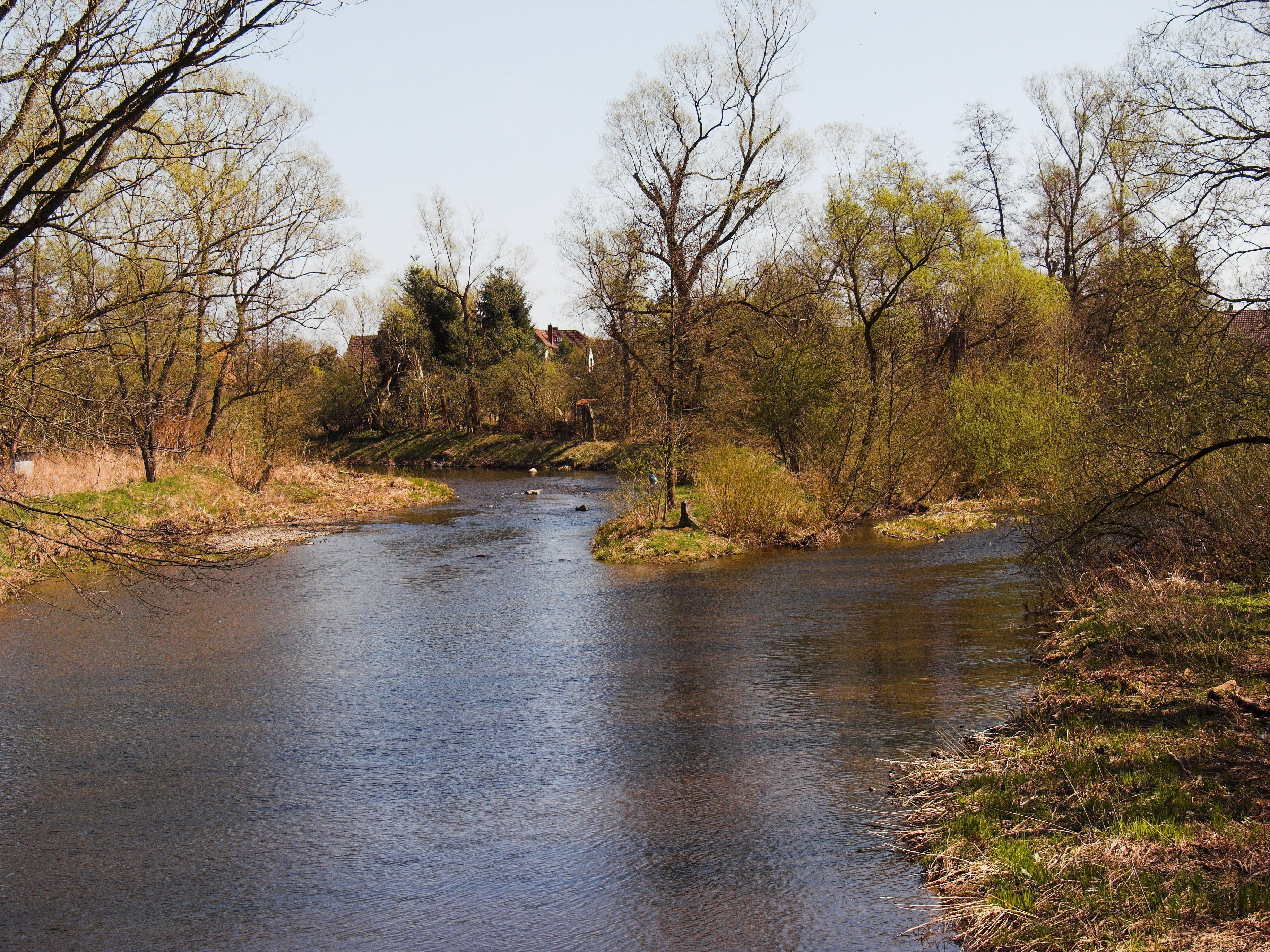 Zusammenfluss von Oder (rechts) und Sieber (links) bei Hattorf; der Mündungsbereich liegt überwiegend im Naturschutzgebiet „Siebertal“, geringere Teile im Bild liegen im NSG „Oderaue“.